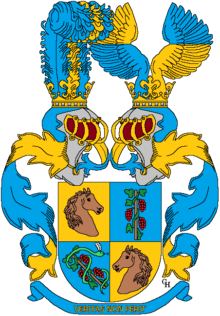 Wappen des österreichischen Oberfinanzrates Heinrich Knaffl-Lenz, verliehen anlässlich seiner Erhebung in den österreichischen Ritterstand mit dem Prädikat "von Fohnsdorf" 1867. Zeichnung von Gerd Hruška ( Für weitere Informationen zu dieser Standeserhebung siehe (